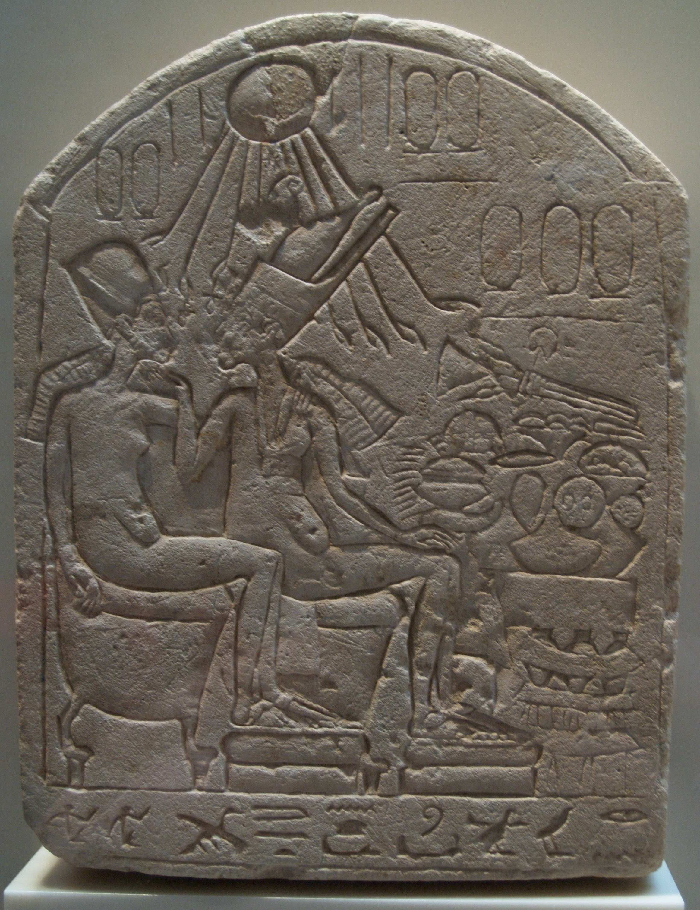 Berlín. Neues Museum. Relieve con Akenatón y Nefertiti.